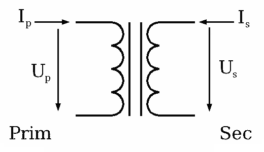 Schaltbild eines Transformators